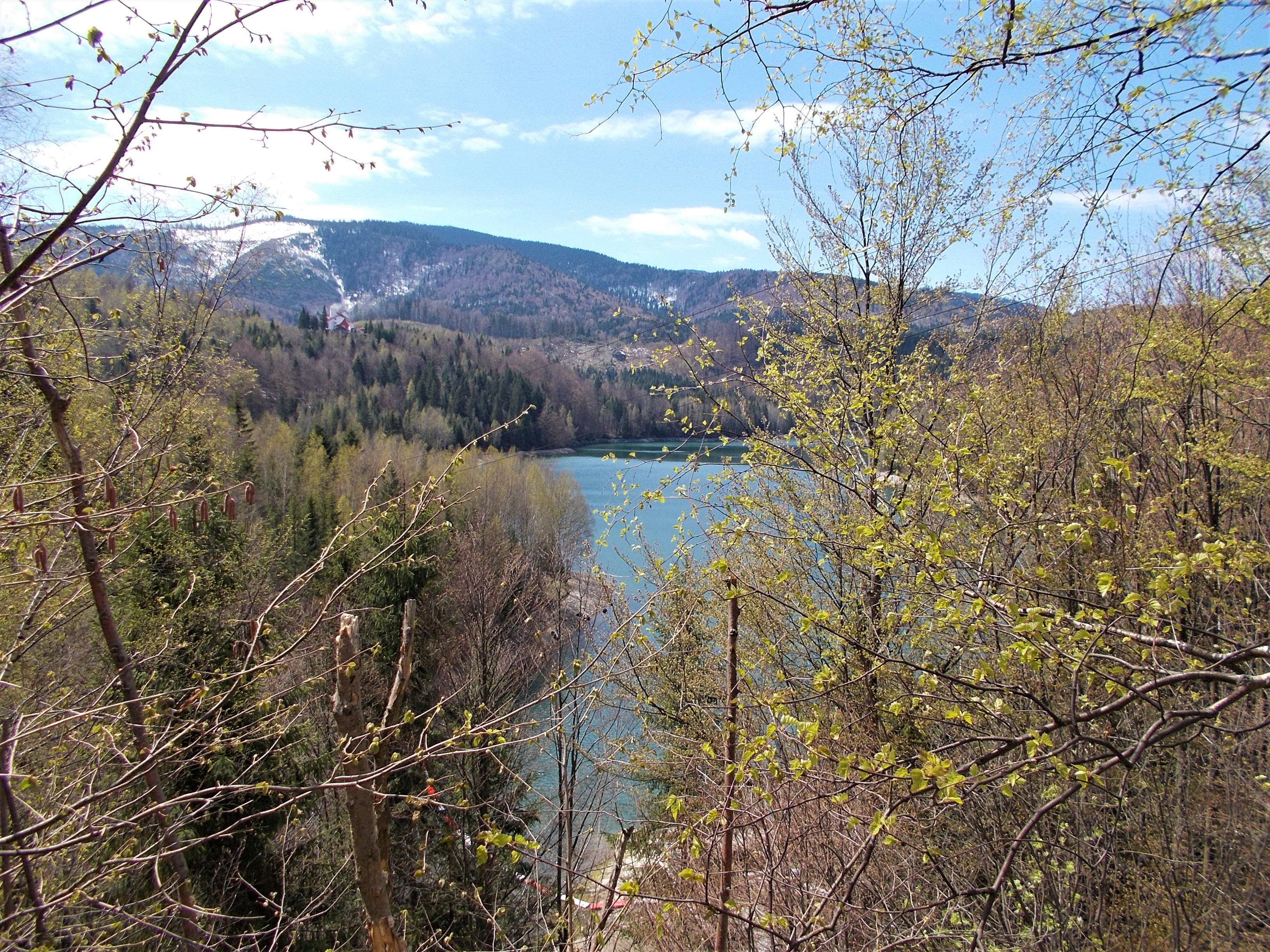 Barajul Valea de Pești, Câmpu lui Neag, județul Hunedoara